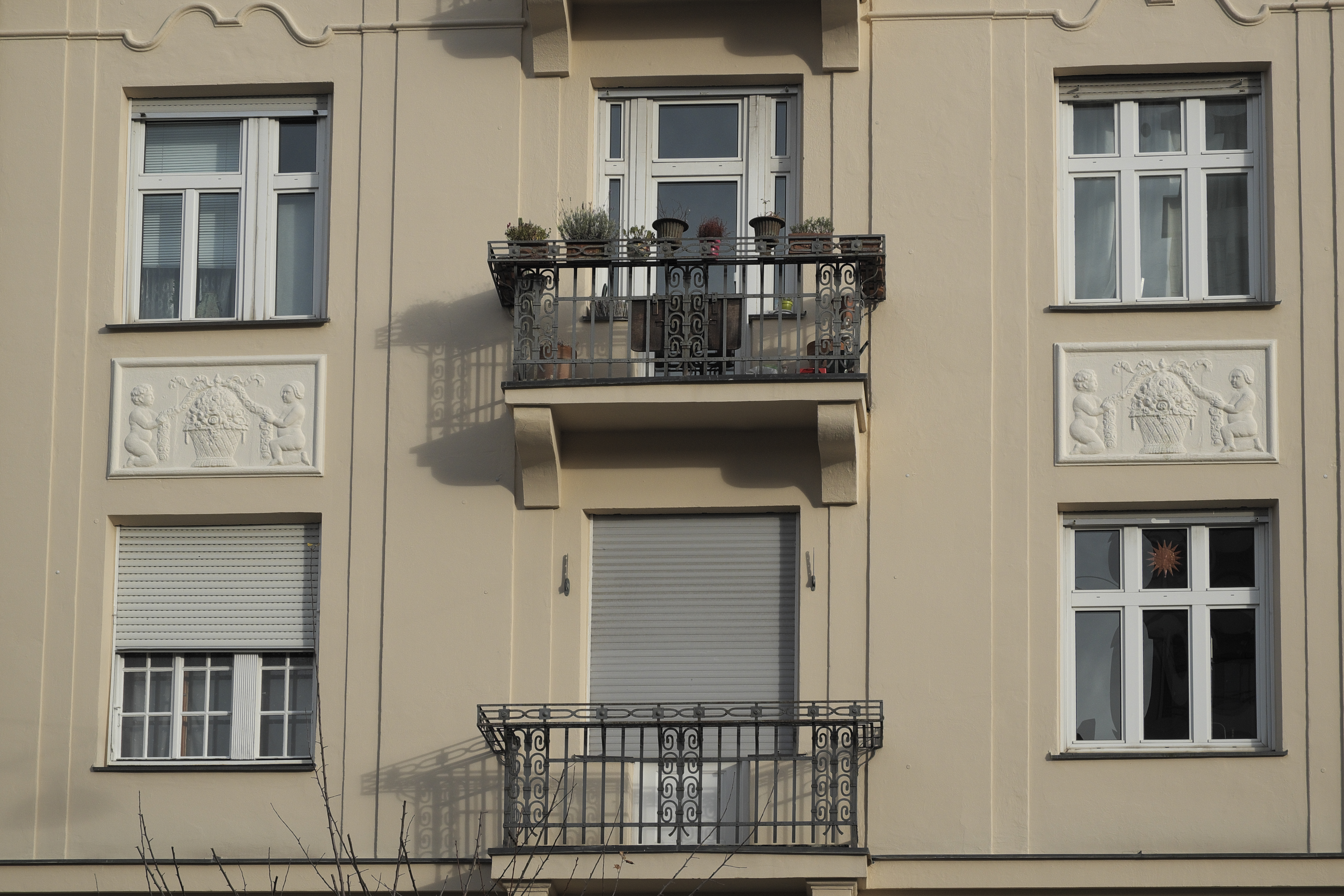 Mietshaus in der Wendl-Dietrich-Straße 9 in Neuhausen im Stadtbezirk Neuhausen-Nymphenburg in München (Bayern/Deutschland), um 1910